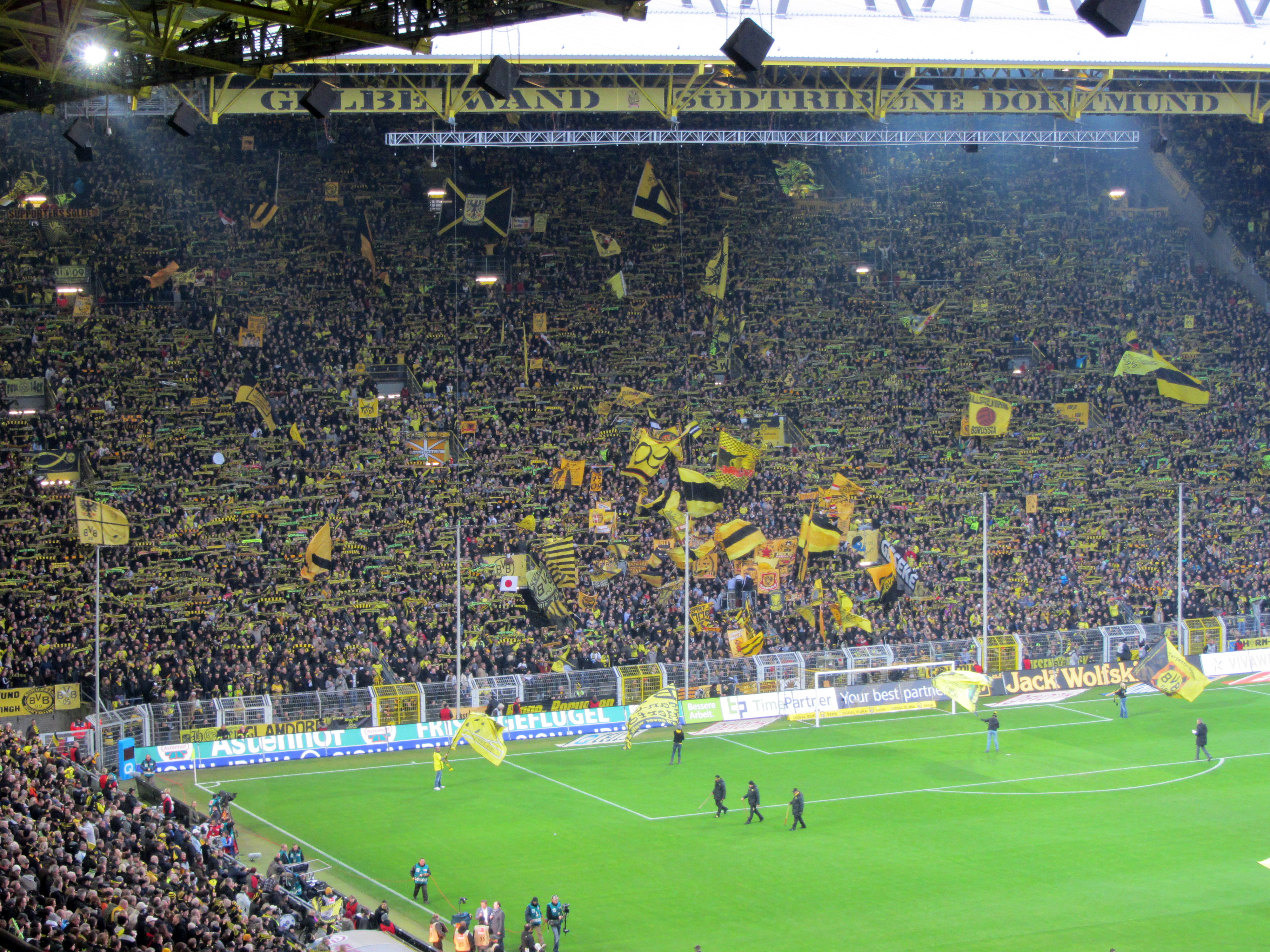 Signal Iduna Park (Westfalenstadion), Borussia Dortmund–Hannover 96, 26-Feb-2012, Südtribüne